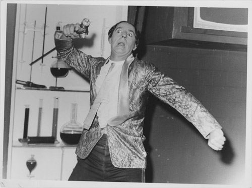 Tristán en la película El hombre invisible ataca (1967).